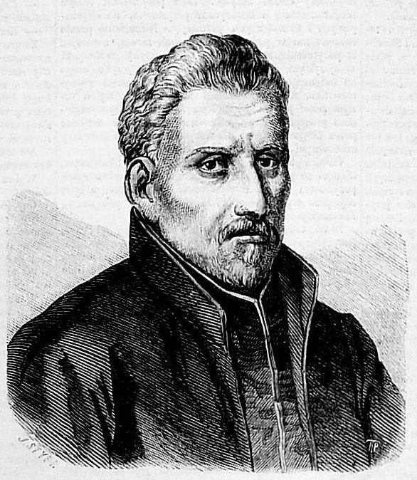 Grzegorz Knapski 1561-1639